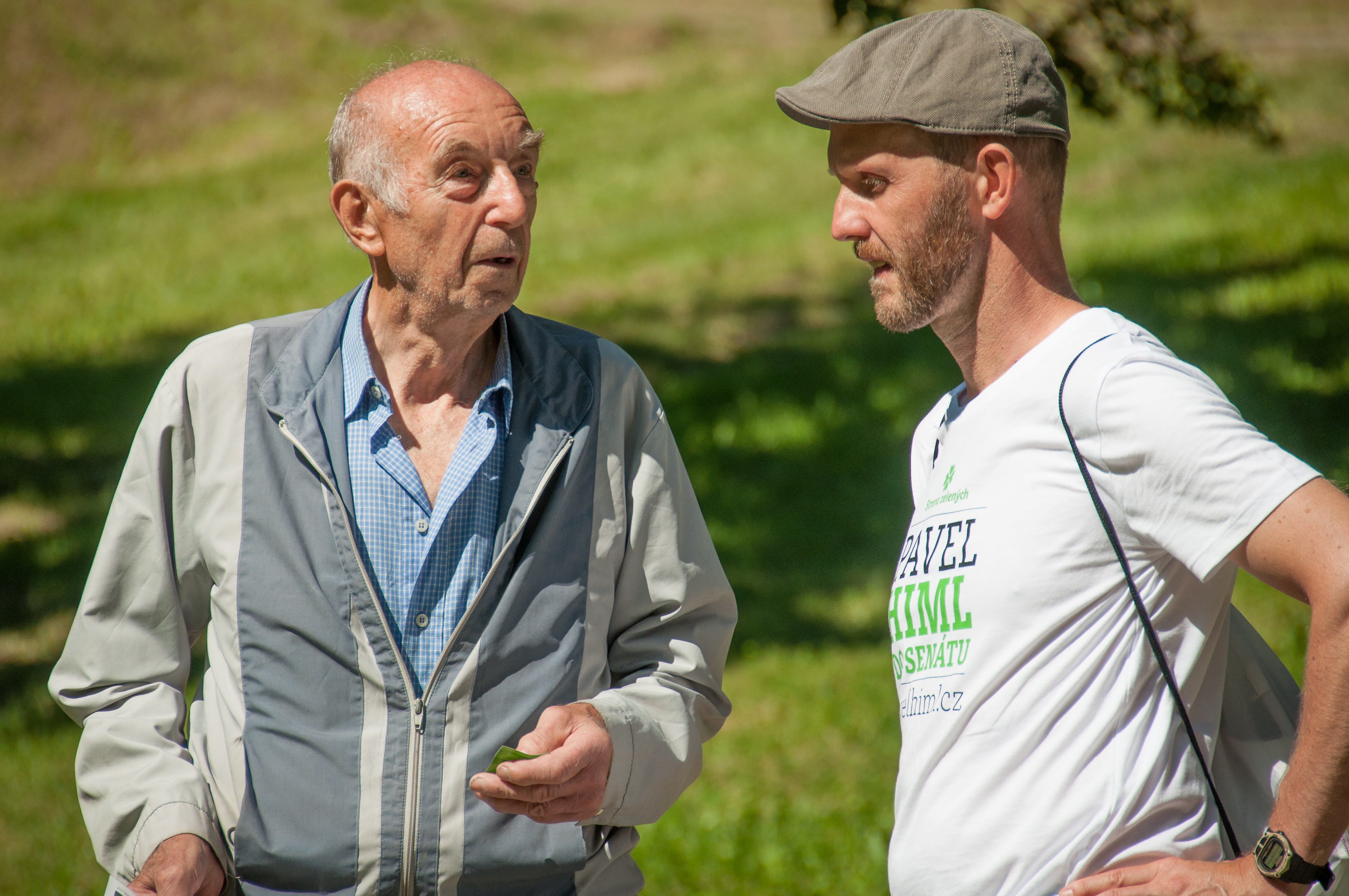 Pavel Himl během mluví s voličem během kontaktní kampaně do senátu (Český Krumlov)